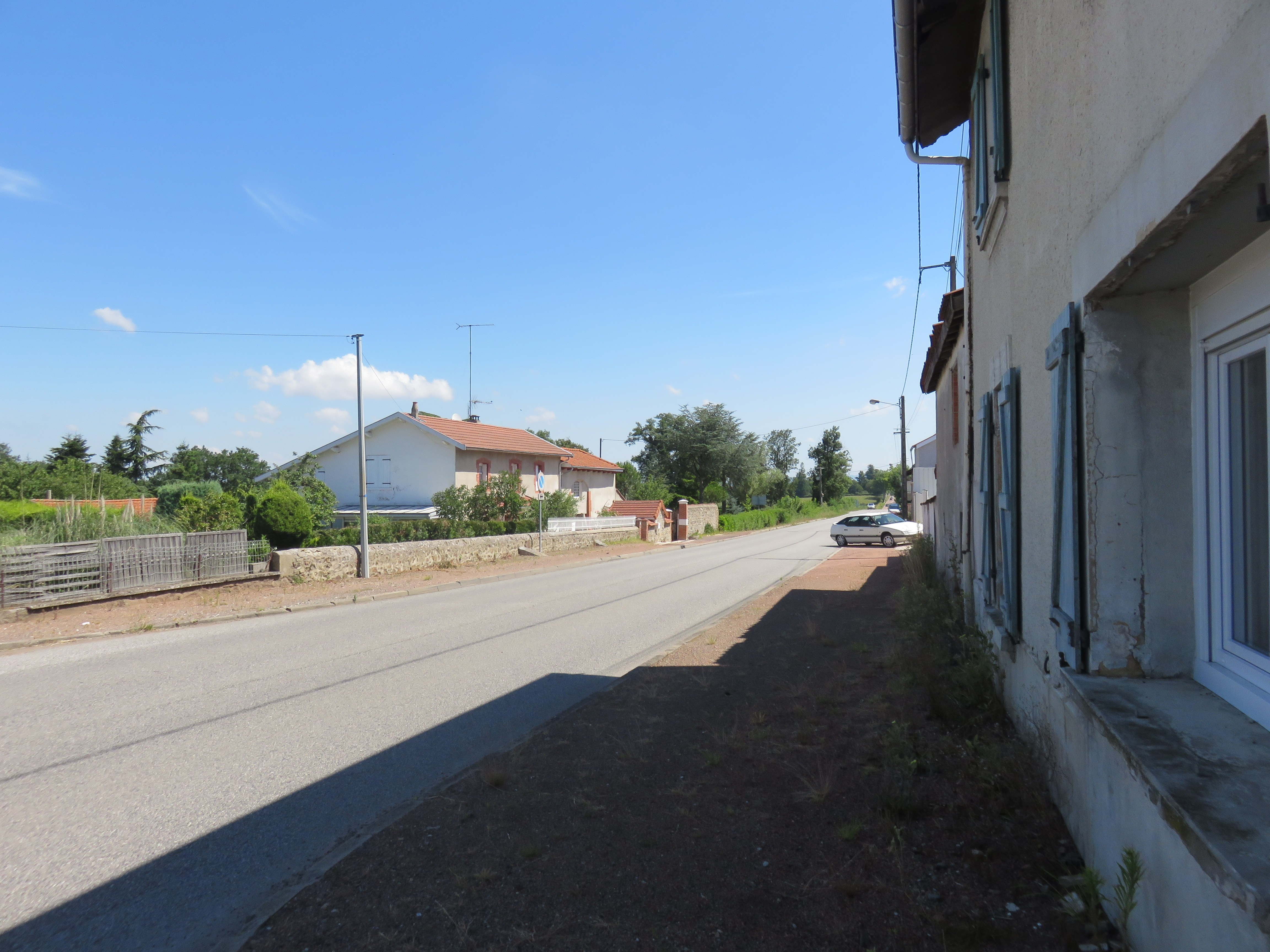 Vue de la route départementale 53 au lieu-dit le Cabaret de l'Âne, sur la commune de Ouches (Loire, France).